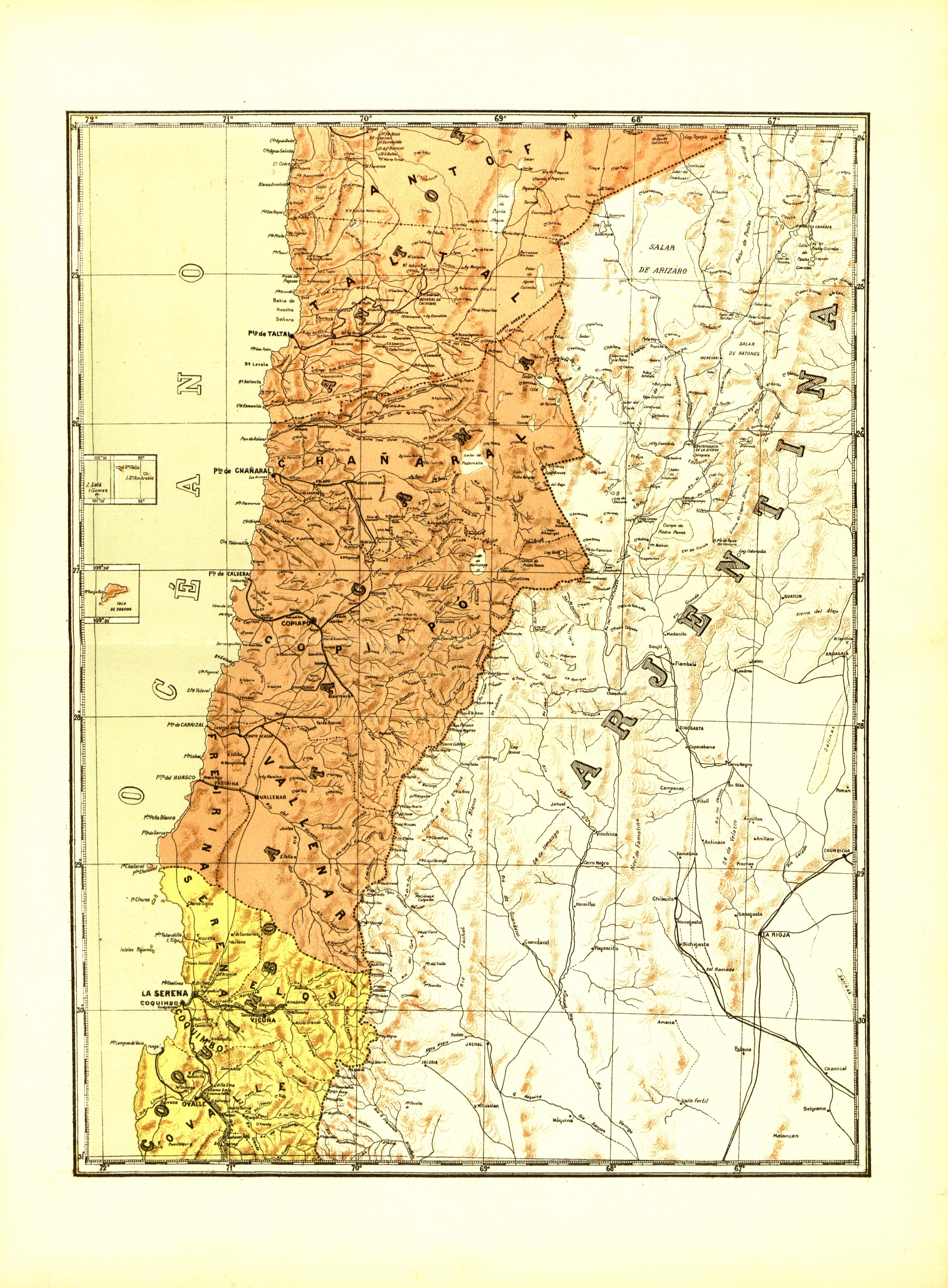 Mapa de Chile 1904 publicada por Carlos Tornero en Chile descripción física, política, social industrial y comercial de la república de Chile